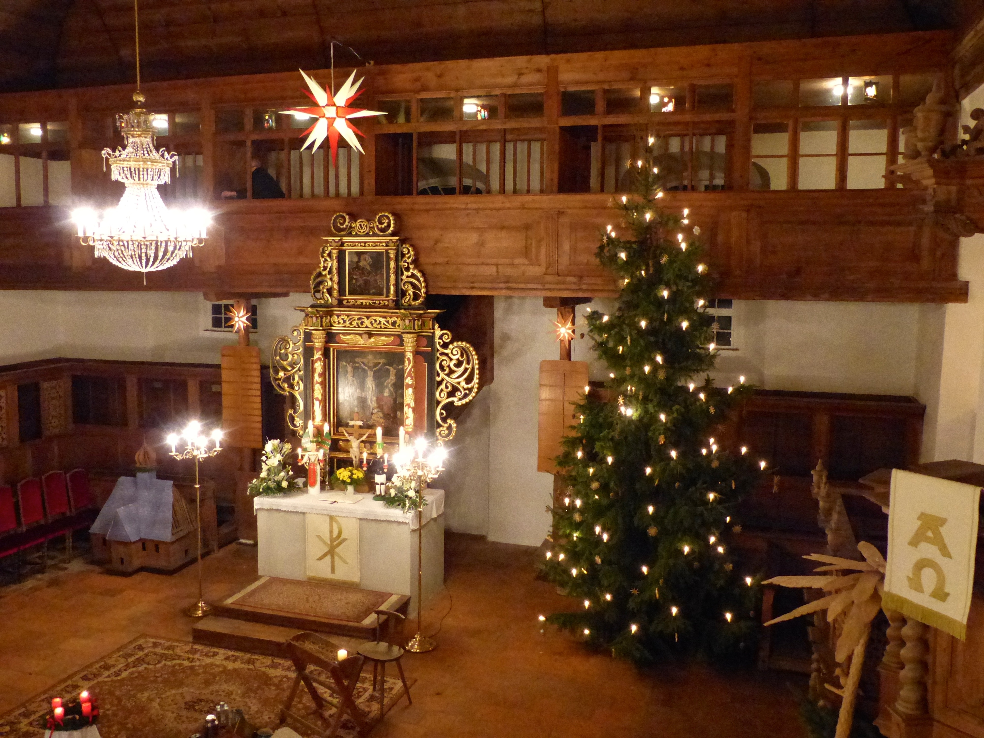 Exulantenkirche Oberneuschönberg: Altarraum mit Altar, Kronleuchter, Altarempore, Herrnhuter Weihnachtsstern am Weihnachtsabend